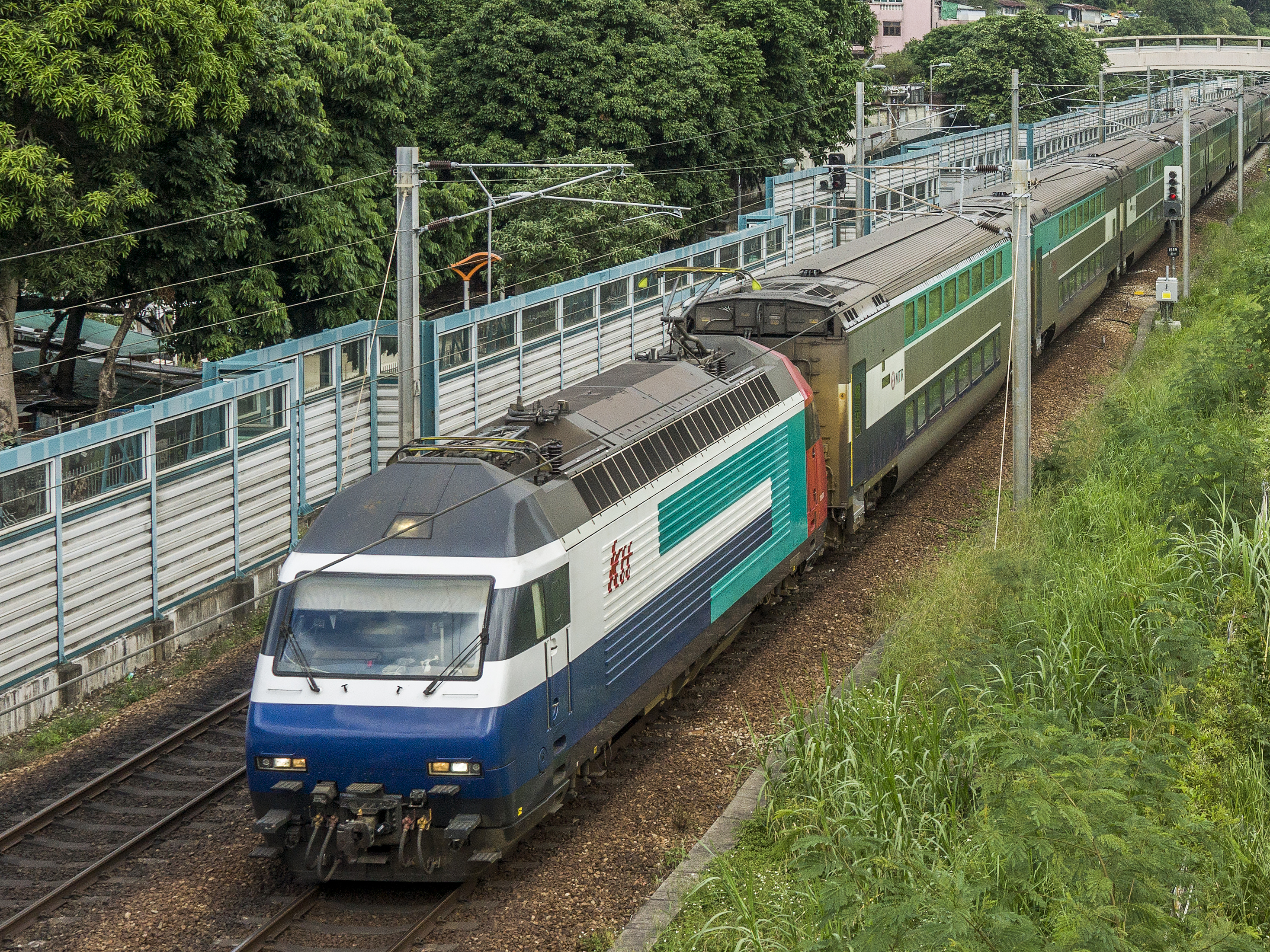 TLN 001 Z 823 Guangzhoudong - Hong Kong Hung Hom Hong Kong Sha Tin